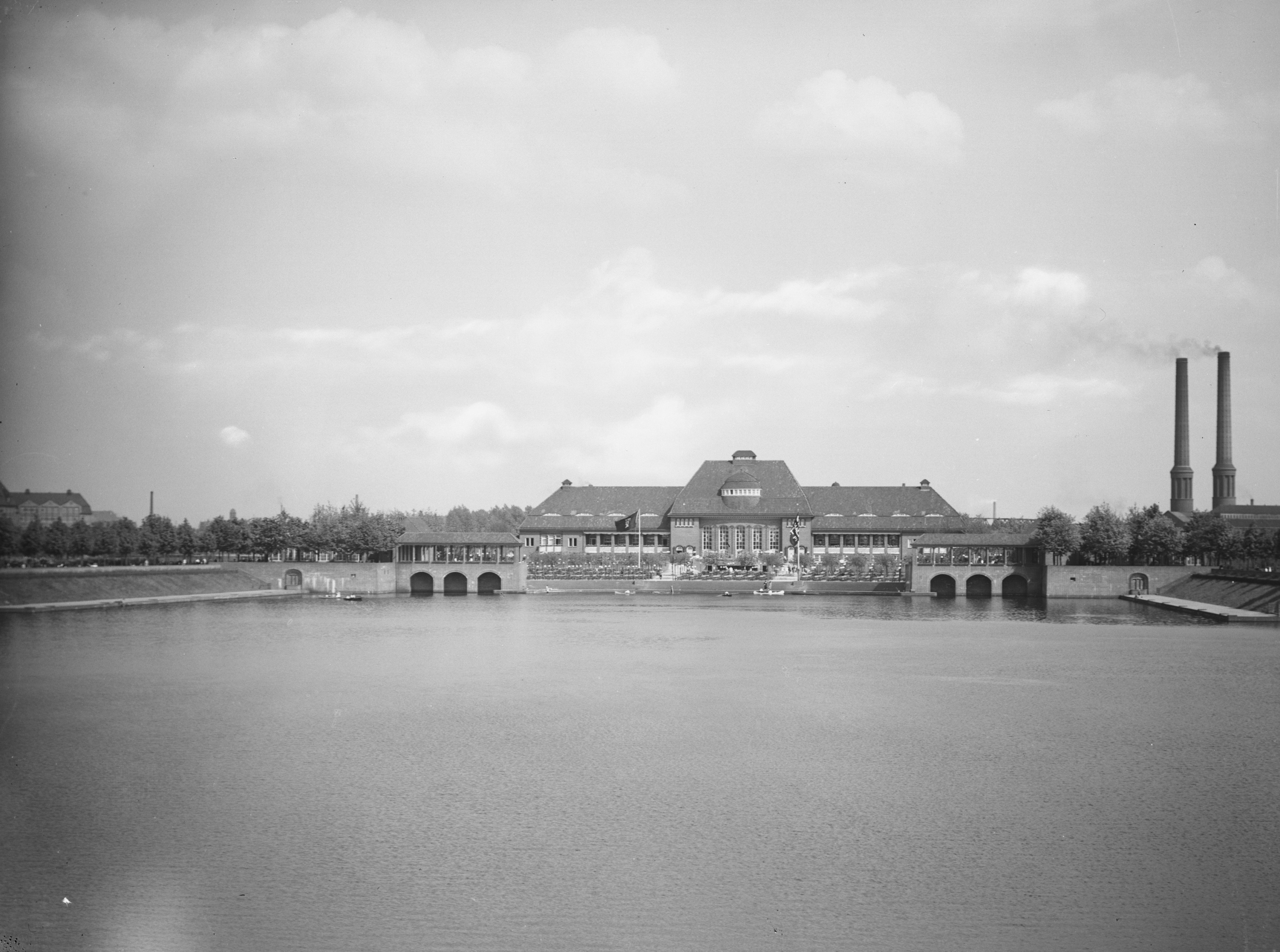 Stadthalle [Hauptrestaurant im Stadtpark] (Hamburg-Winterhude): Front Seeseite SchumacherWV Nr. 146